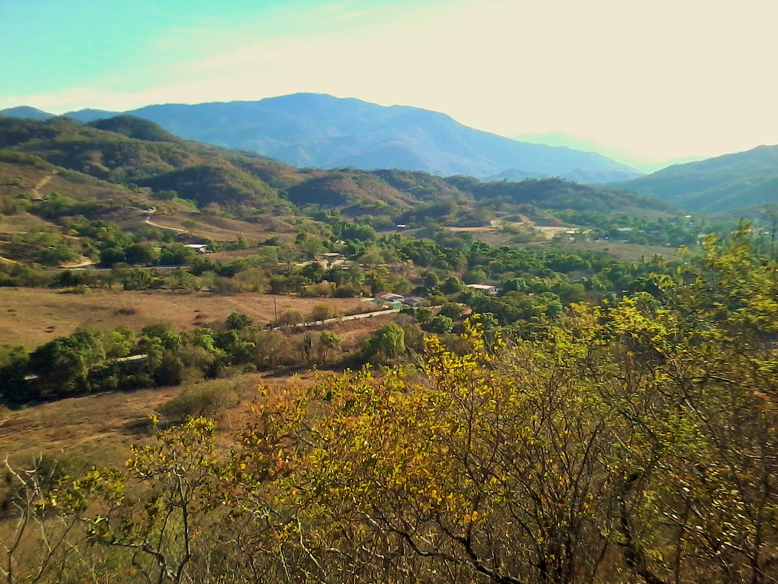 Vista aerea Plan de Lima, Gro